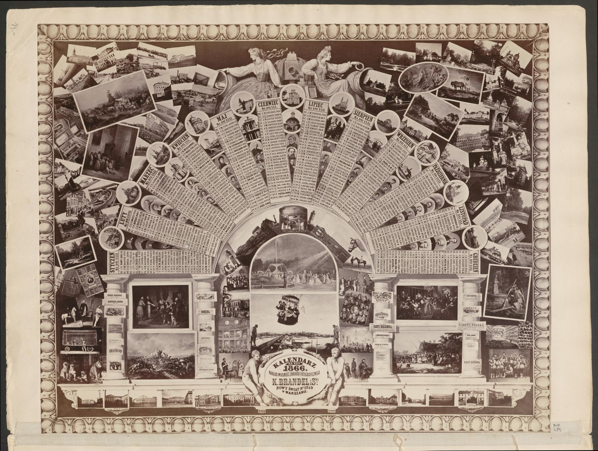 Nakład i własność zakładu fotograficznego K. Brandel i S-ka. Nowy Świat No 1249 w Warszawie.